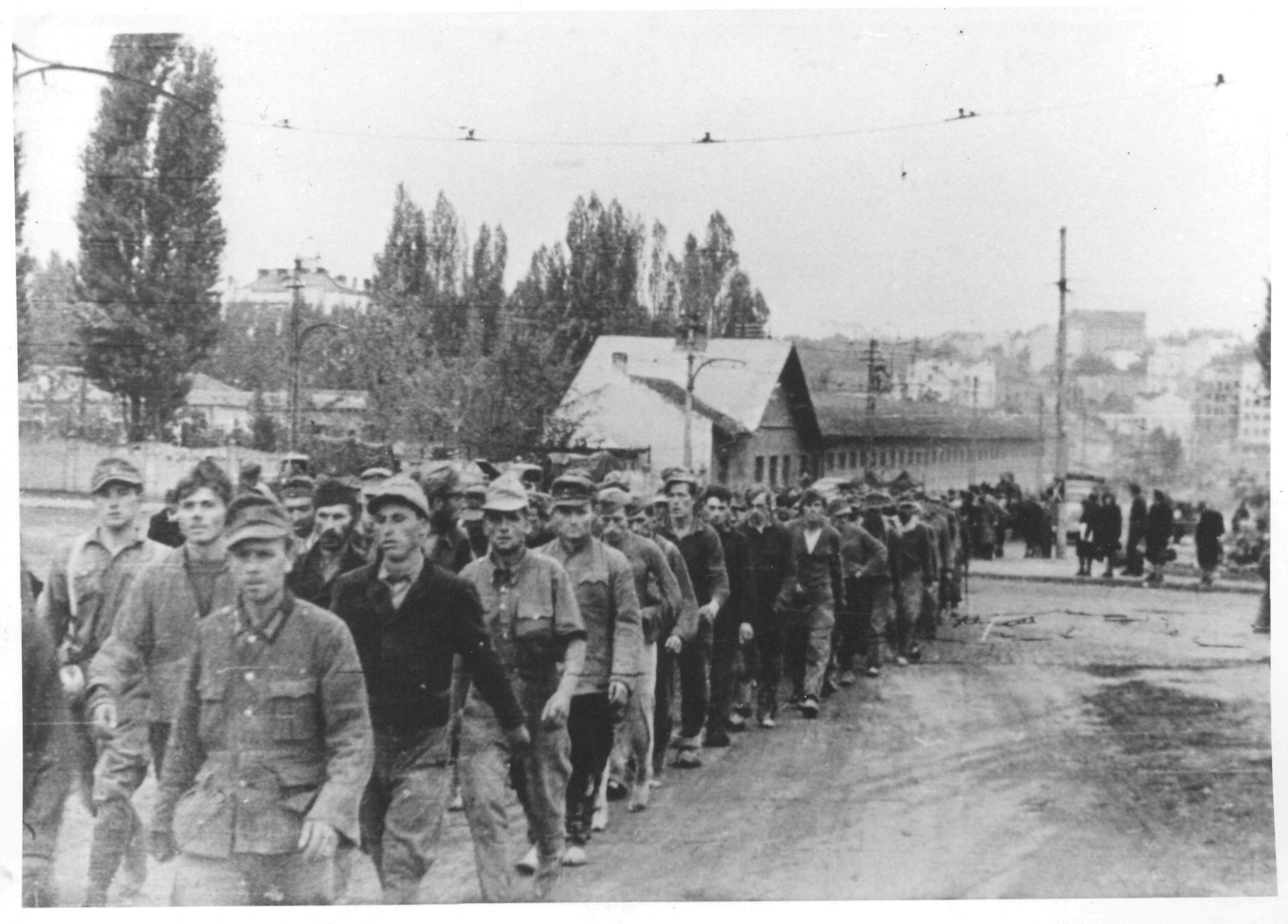 Srpskohrvatski / српскохрватски: Zarobljeni Nemci u Beogradu oktobra 1944